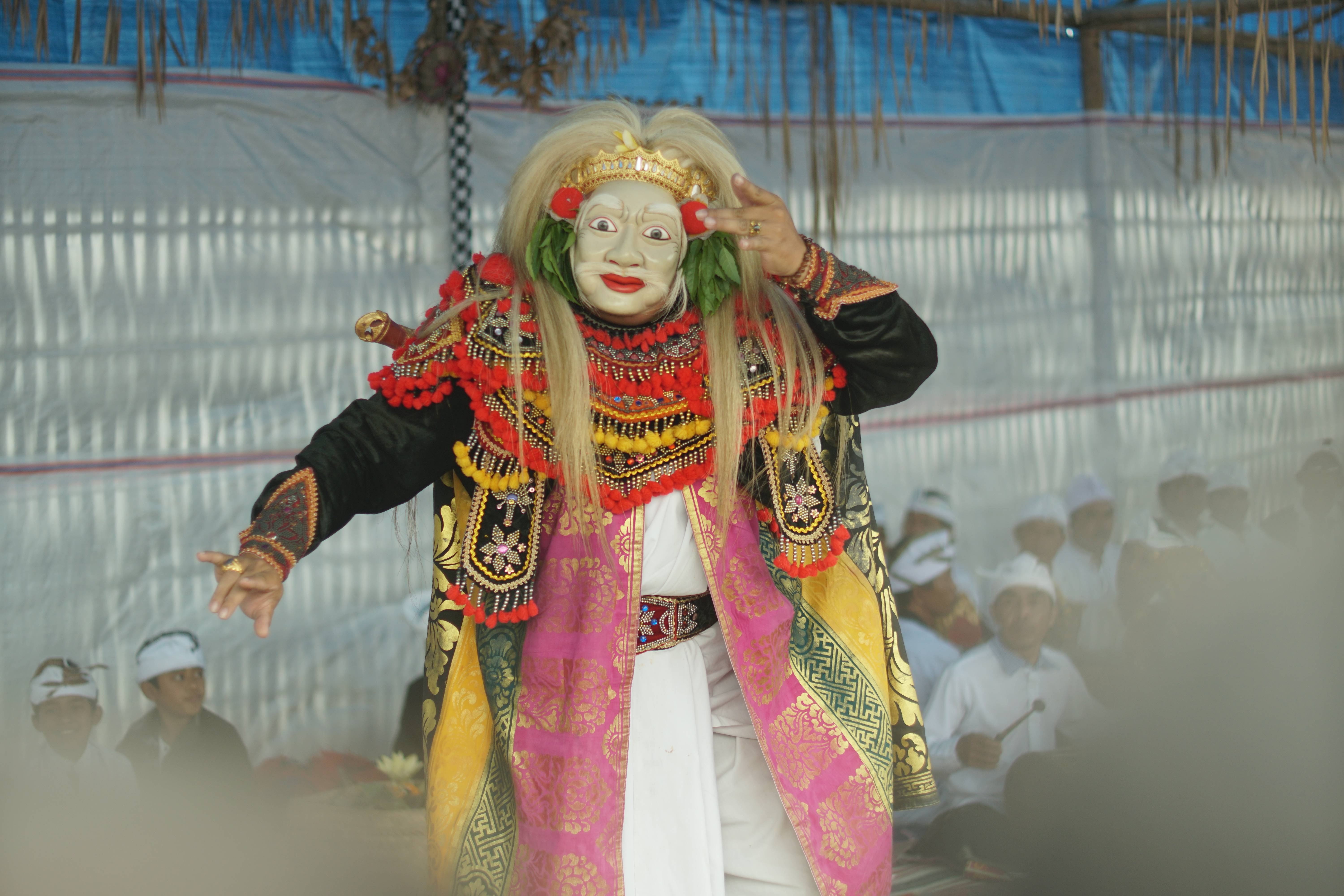 Topeng Sidakarya merupakan salah satu tarian yang wajib dipentaskan di beberapa upacara keagamaan di Hindu Bali